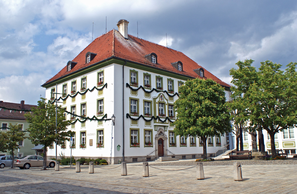 Rathaus Bad Kötzting